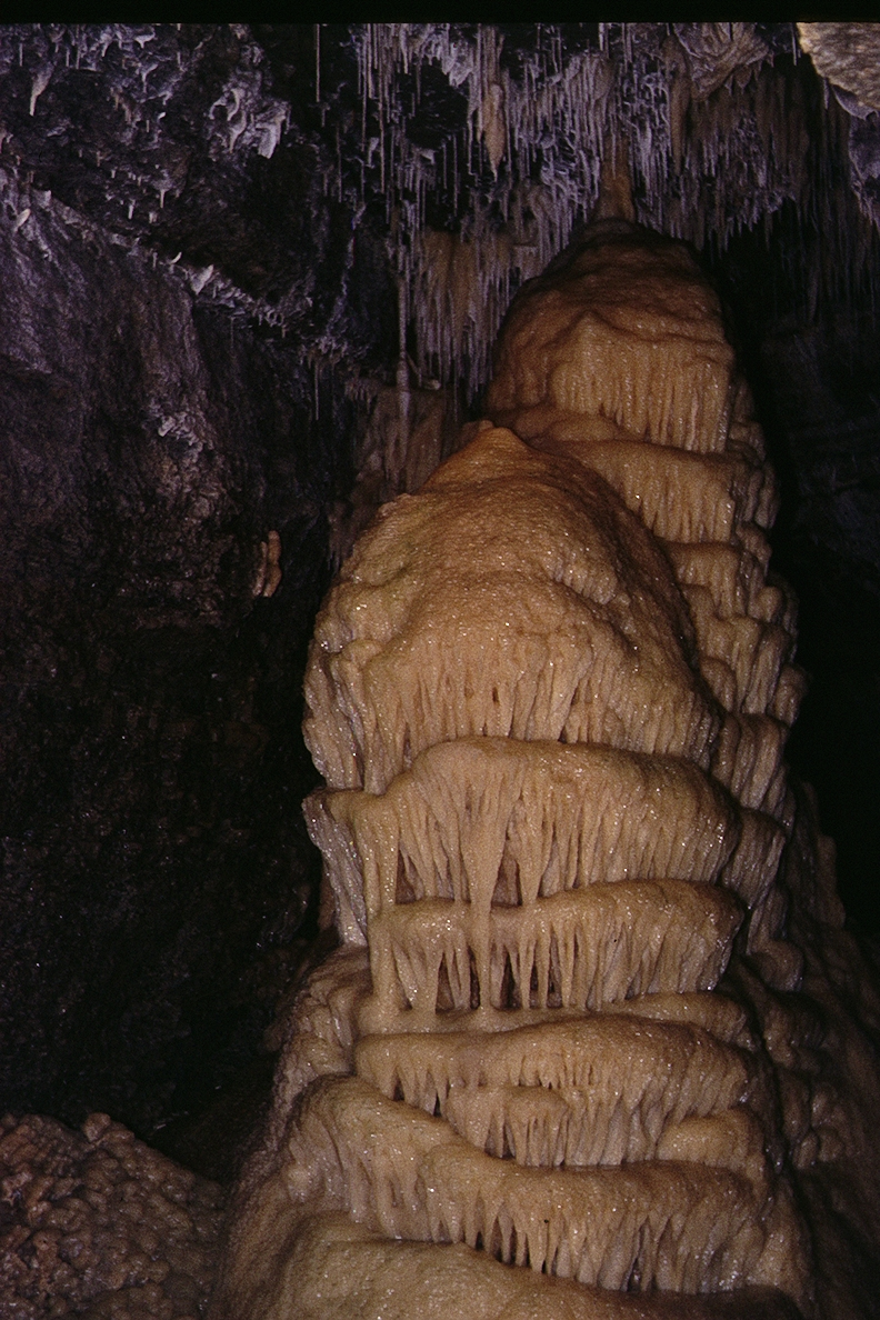 Eberstadter Tropfsteinhöhle: Tropfsteinformation 'Hochzeitstorte'